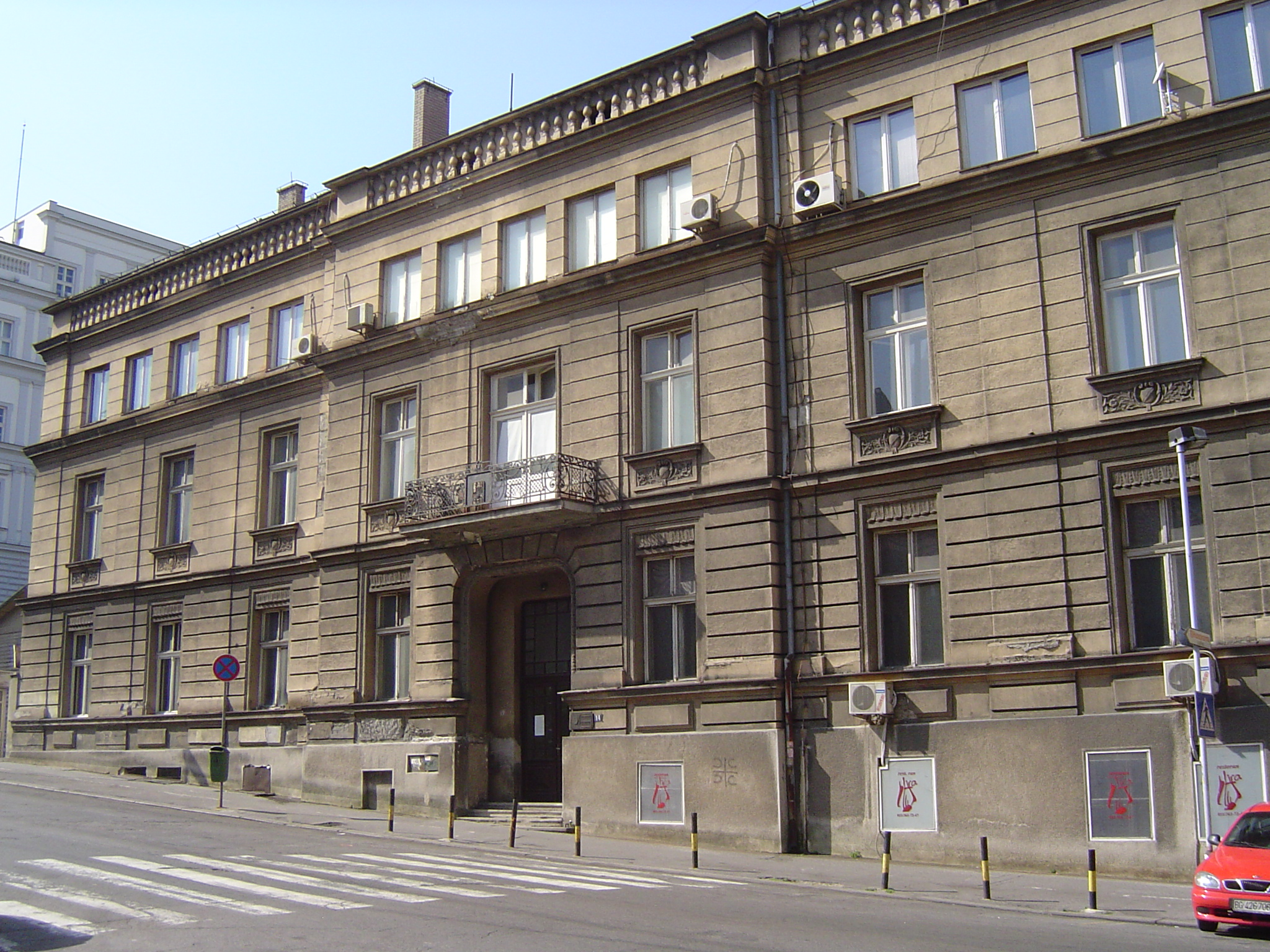 Institute for photogrammetry in Admirala Geprata Street in Belgrade – the building from which Zvezdan Jovanović assassinated Serbian Prime Minister Zoran Đinđić on 12th March 2003. Serbian: Zavod za fotogrametriju u Ulici admirala Geprata 14, u Beogradu – zgrada iz koje je Zvezdan Jovanović izvršio atentat na premijera Srbije Zorana Đinđića 12. marta 2003.